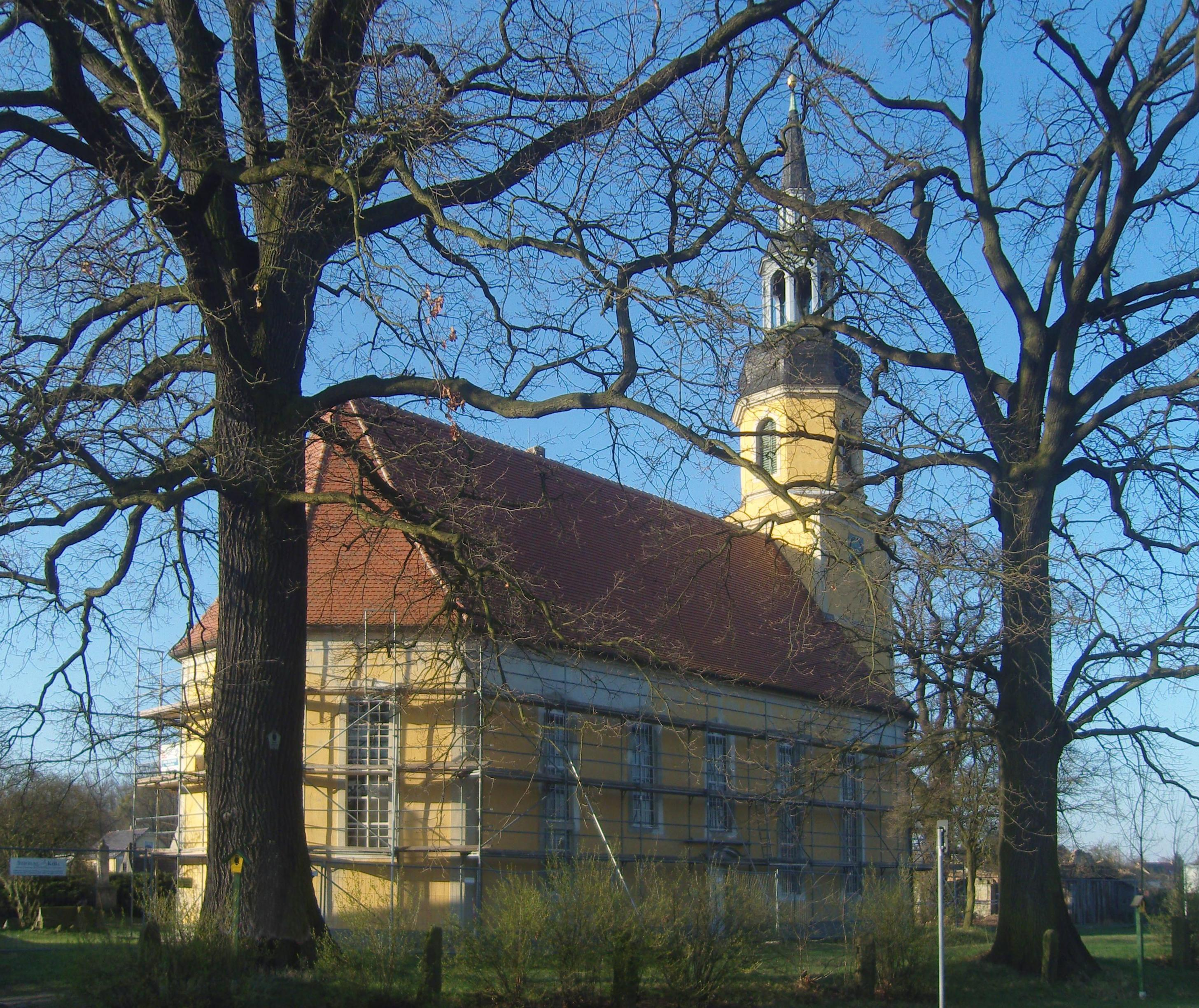 Dorfkirche in Kroppen sowie davor zwei geschützte Stieleichen